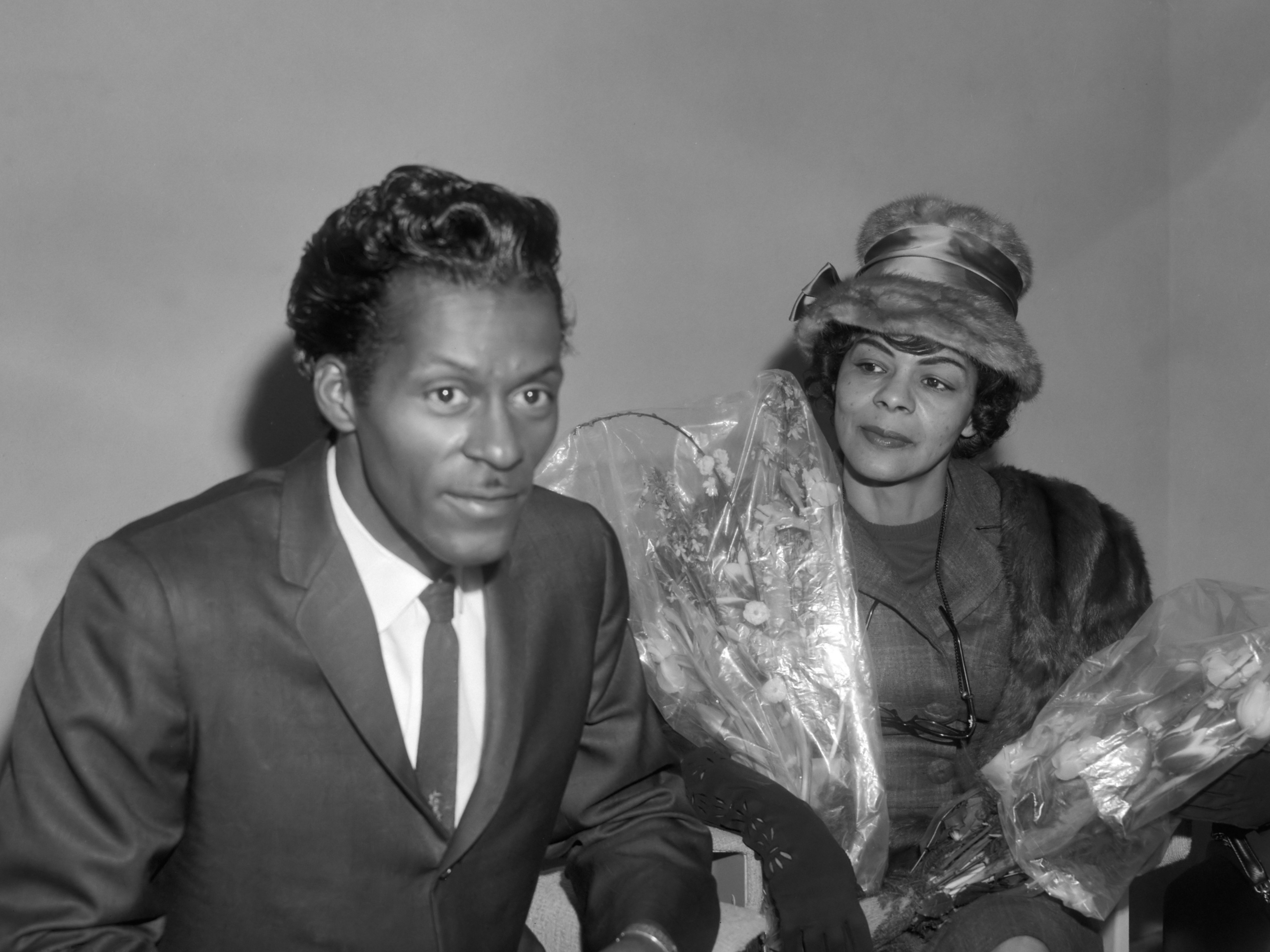 Aankomst Chuck Berry (zanger) op Schiphol, Chuck Berry en zijn zus Lucy Ann tijdens persconferentie 3 februari 1965